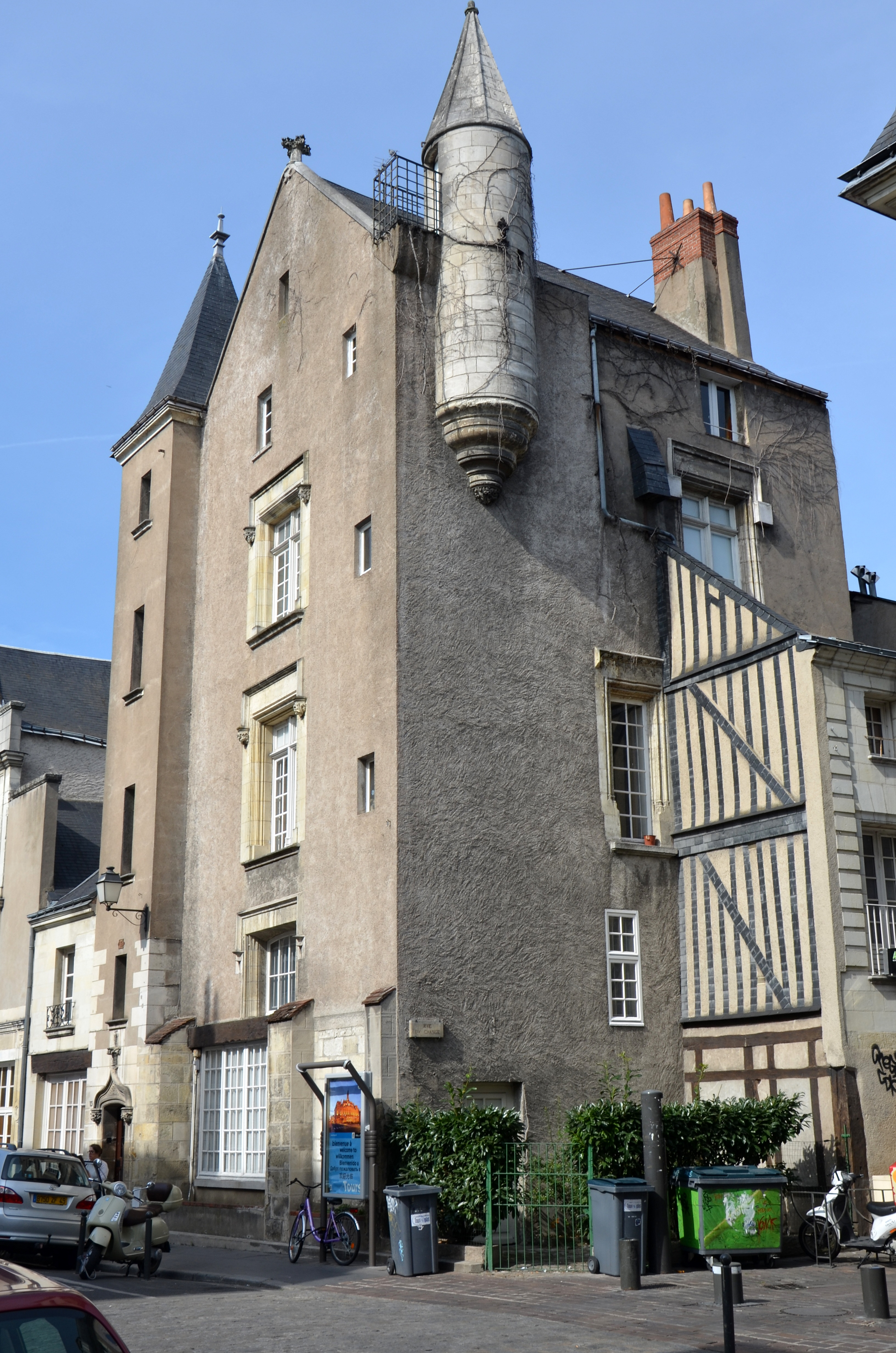 Hôtel particulier du XVe siècle dit de Jean Briçonnet, situé 11-13 rue du Châteauneuf à Tours (Indre-et-Loire, France).